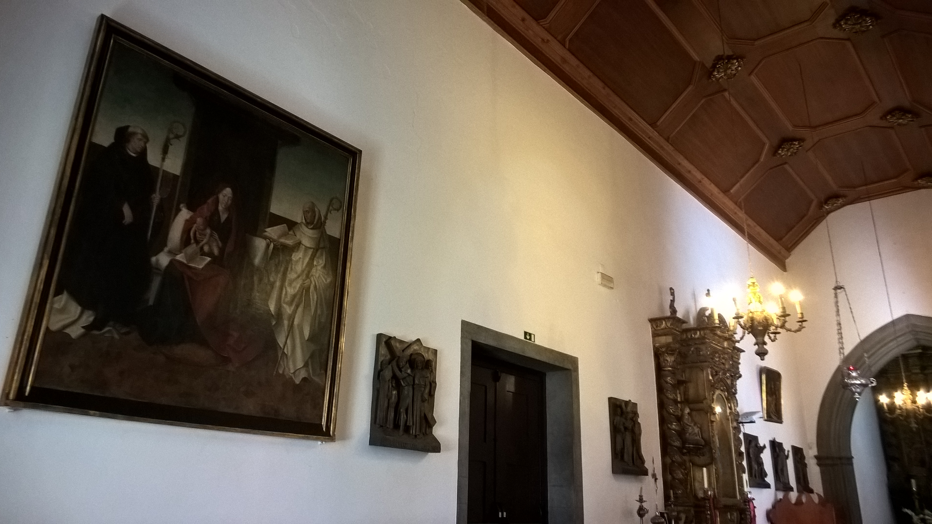 Parede norte interior da Igreja Matriz da Ribeira Brava, destacando-se no lado esquerdo a pintura "Nossa Senhora com o Menino, São Bento e São Bernardo" de Francisco Henriques de cerca de 1650.